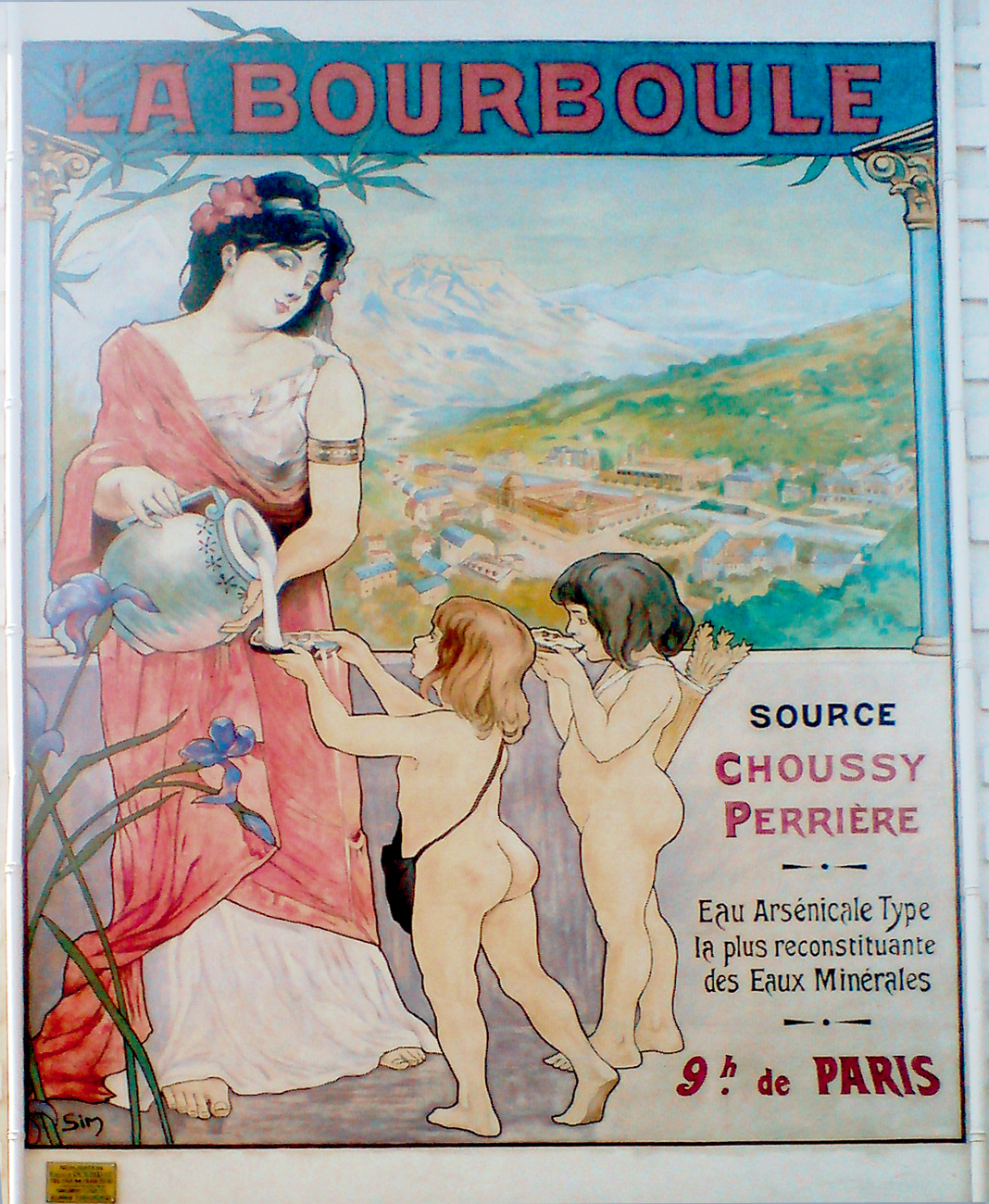 Reproduction sur mur de l’affiche de Sim pour l’eau et la station thermale de la Bourboule, par Fabien Pouzerat